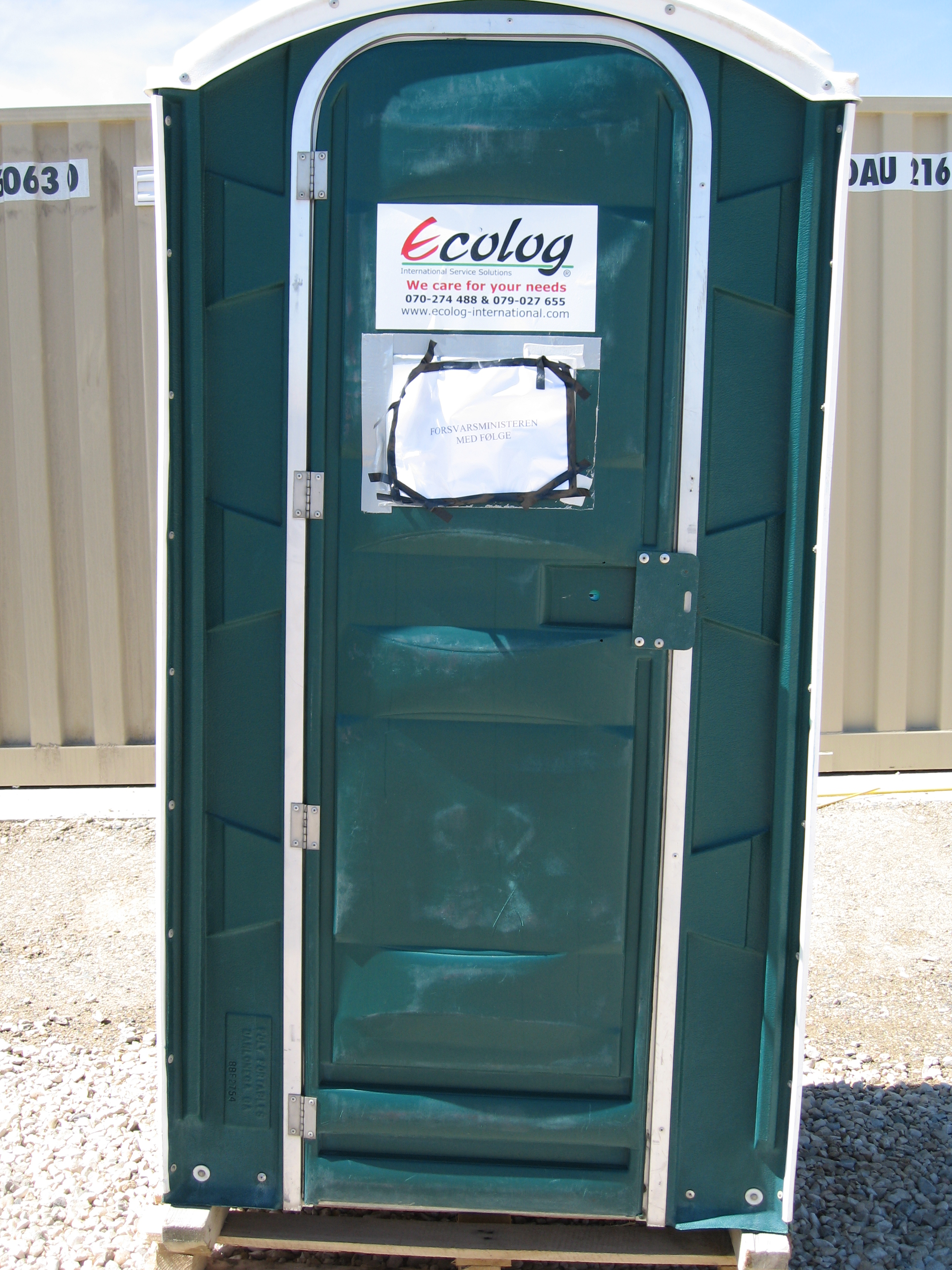 Camp Marmal der Bundeswehr in Afghanistan. Das Bild zeigt eine Mobiltoilette des Militärdienstleistungs-Unternehmens Ecolog.